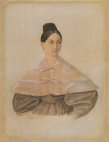 Екатерина Алексеевна Свербеева, урож. Щербатова (1808-1892), с 1828 года была замужем за литератором Д.Н.Свербеевым (1799-1876), хозяйка московского философско-литературного салона, где бывал Пушкин, Лермонтов и Гоголь, имела репутацию умной и высоко образованной женщины.